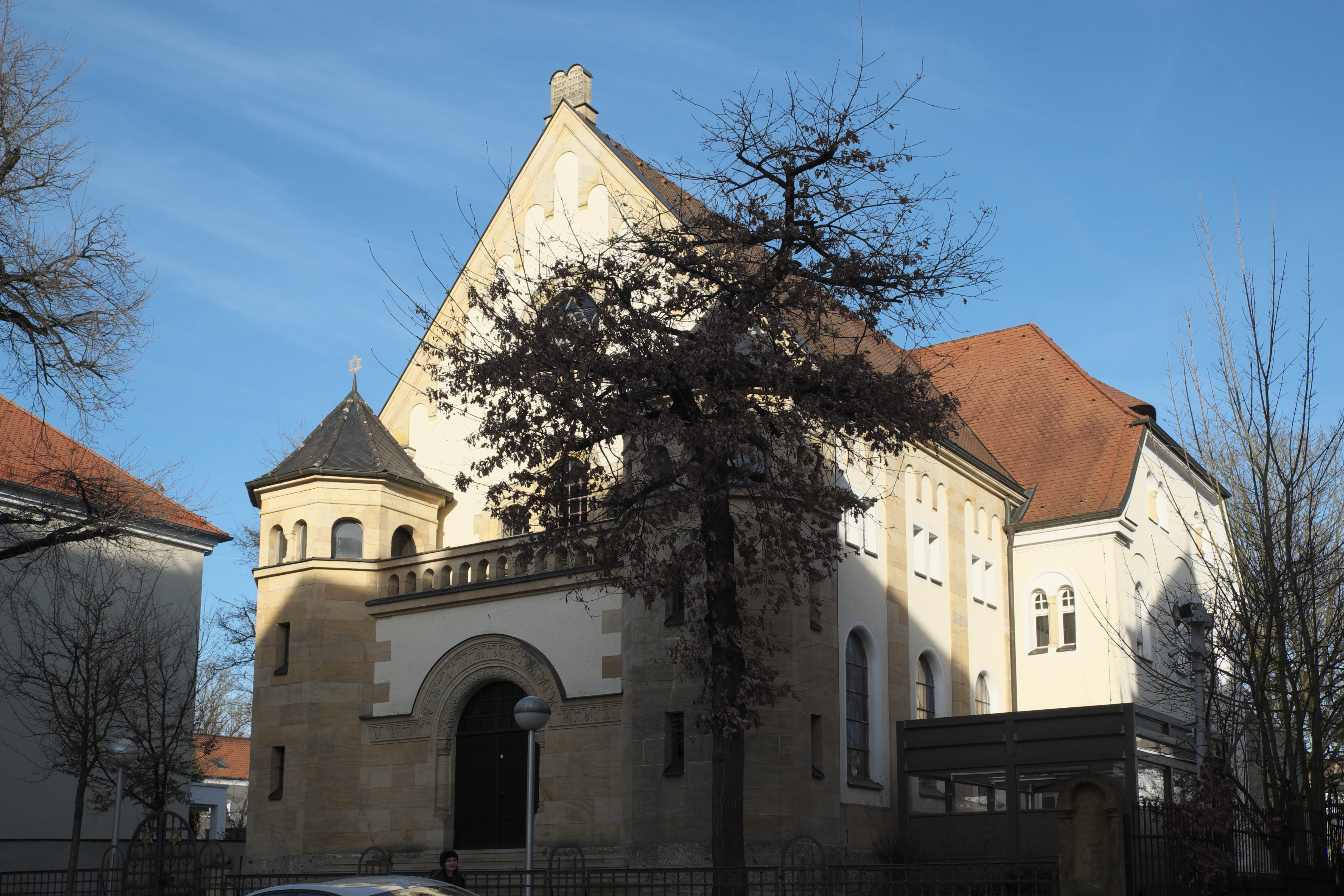 Synagoge in Straubing (Bayern/Deutschland)